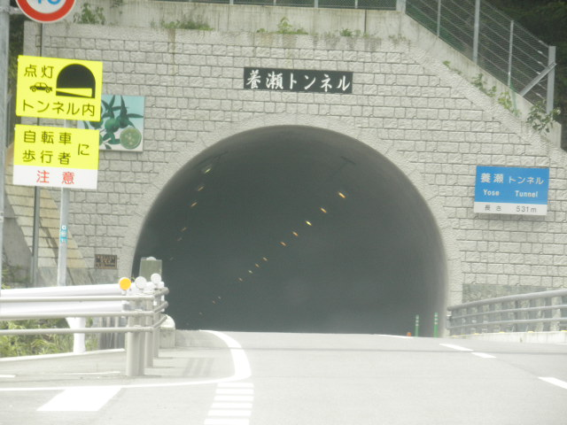 徳島県名西郡神山町鬼籠野喜来 徳島県道21号神山鮎喰線 養瀬トンネル